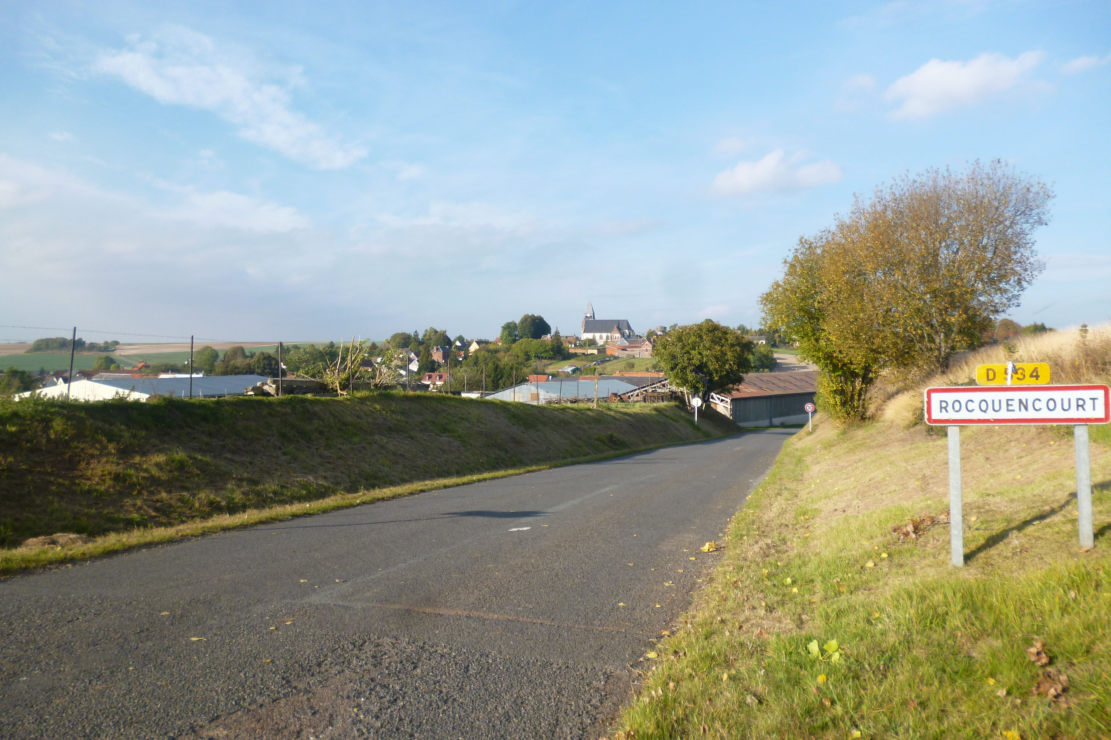 Le village de Rocquencourt (Oise).